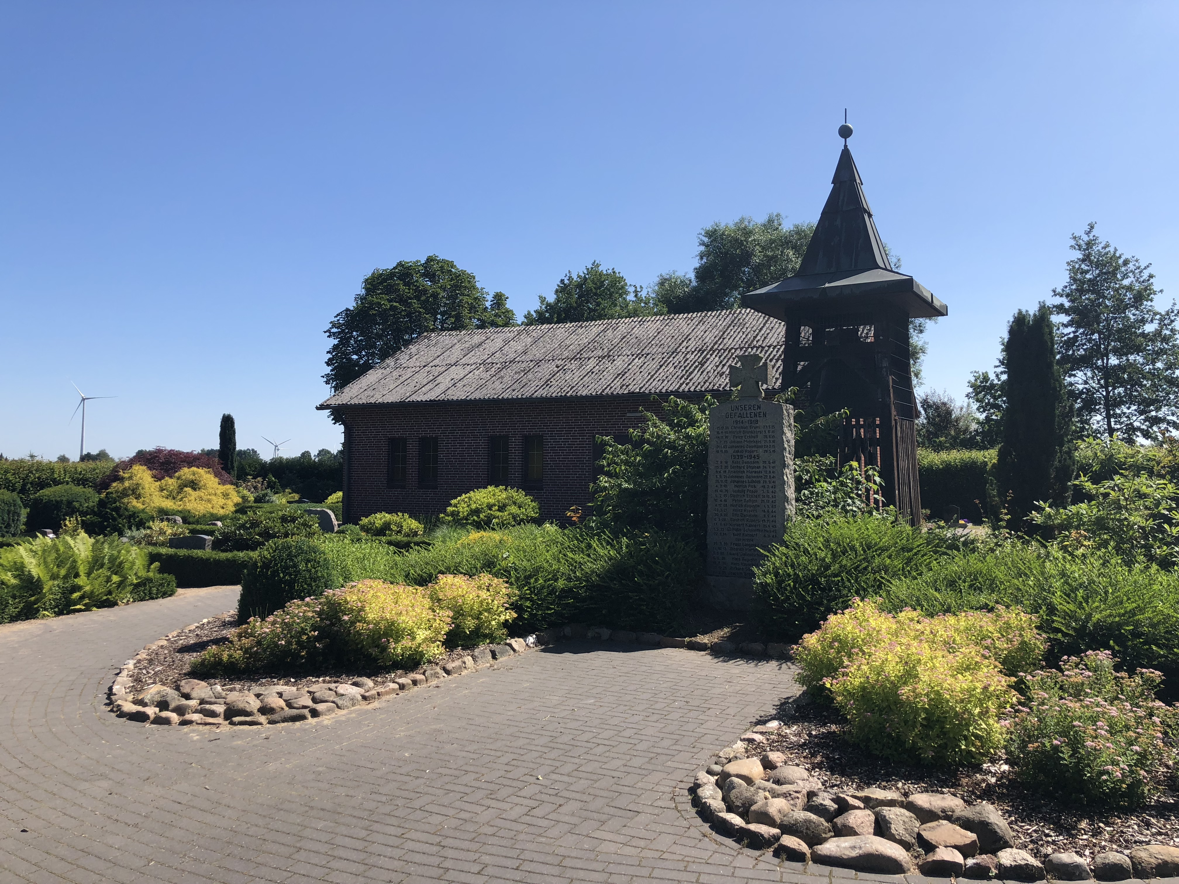 Kriegerdenkmaal op’n Karkhoff in Ruschwedel